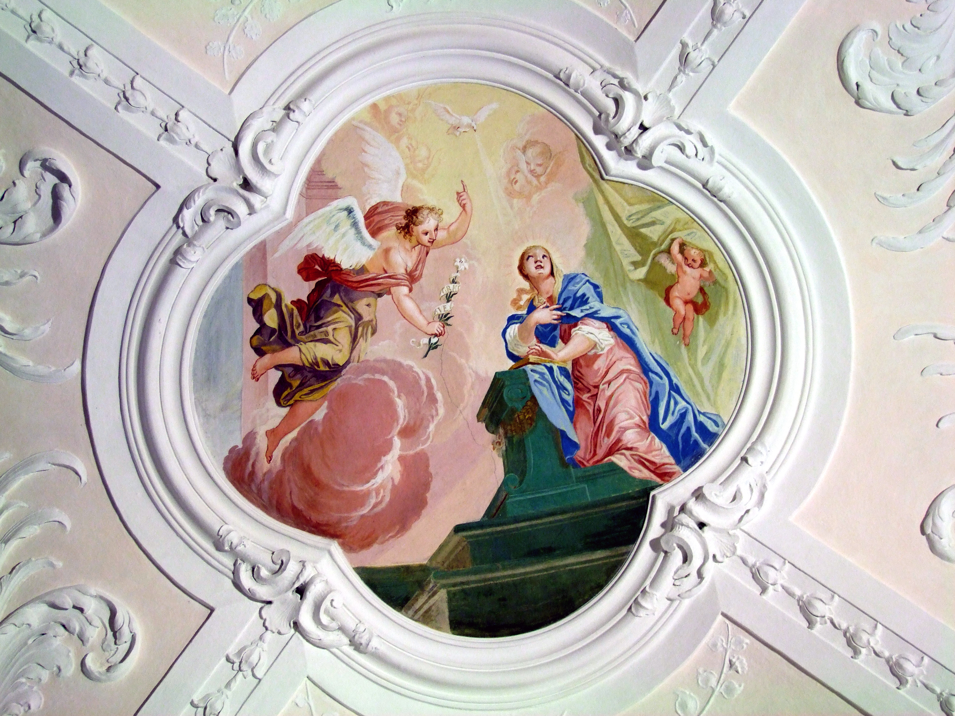 Fresko in der ehemaligen Klosterkirche der Kartause in Buxheim bei Memmingen s - Google Maps - Google Earth